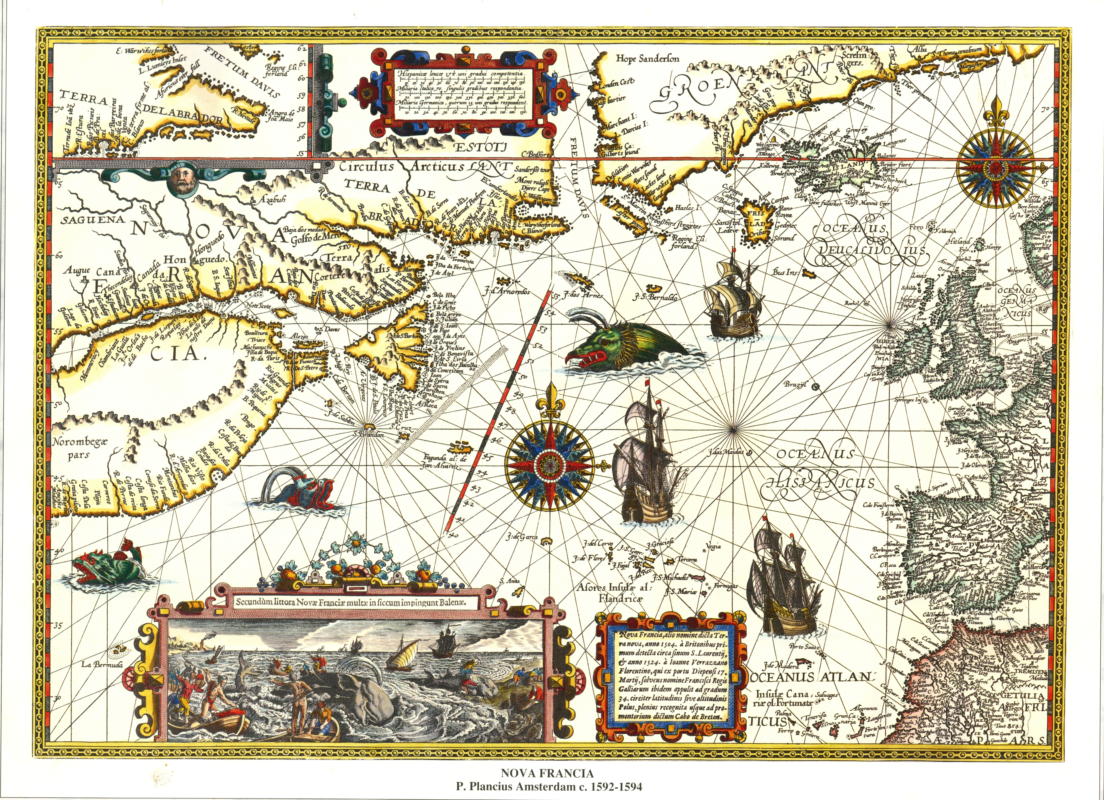 Diapositiva de Consulta y acceso público cuya información fue investigada de un libro y/o ejemplar de revisión custodiado en los Fondos Bibliográficos y Cartográfico (Sección Siglo XVI o Etapa Colonial) del Archivo Histórico del Guayas; Guayaquil, Ecuador.Compartido y consultado usuario J. Javier García A.